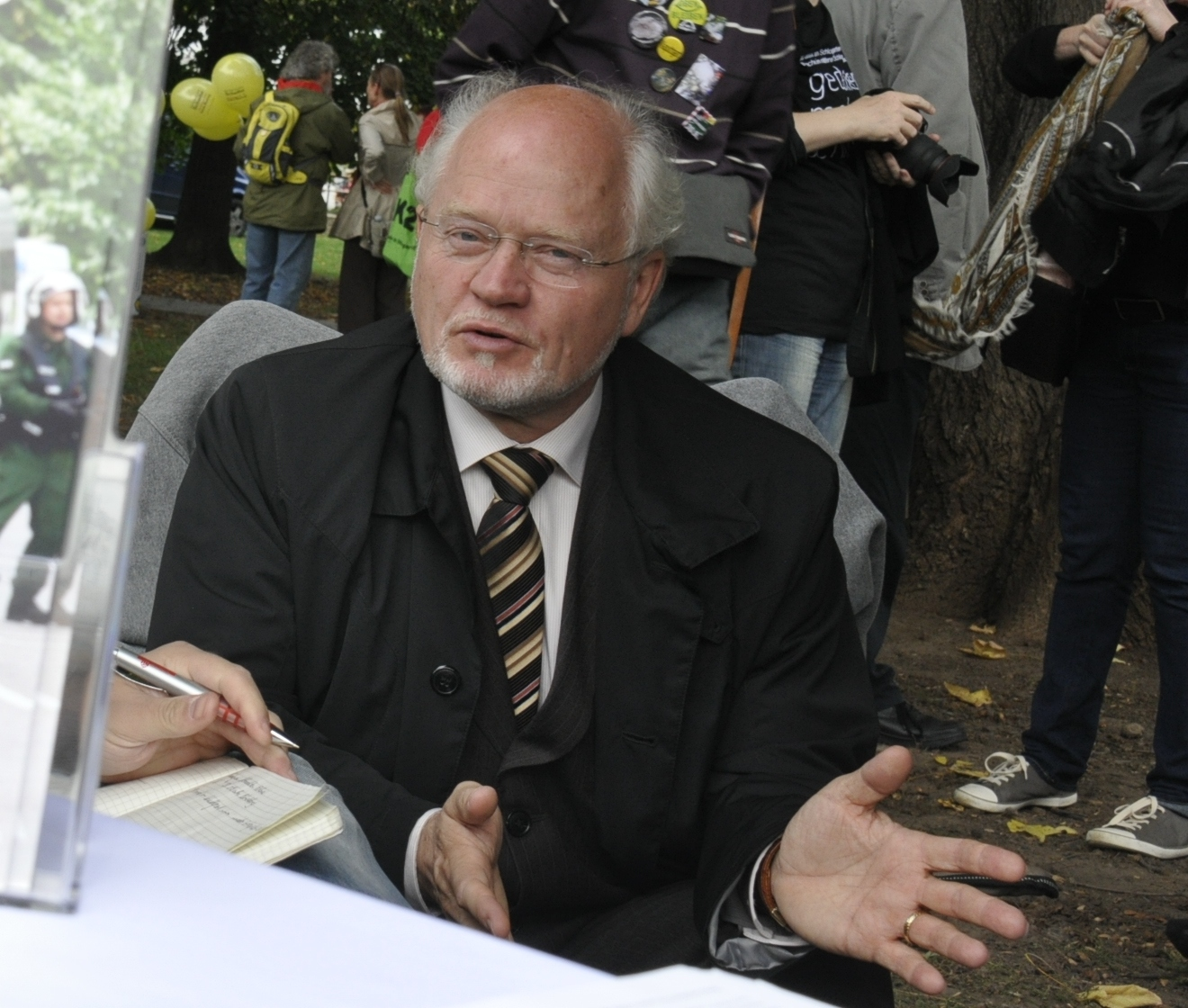 Thomas Wüppesahl, ehemaliger MdB. Veranstaltung Stuttgart 21, 30. September 2012